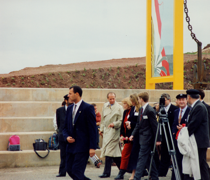 museo anclas Philippe Cousteau inauguración del Rey